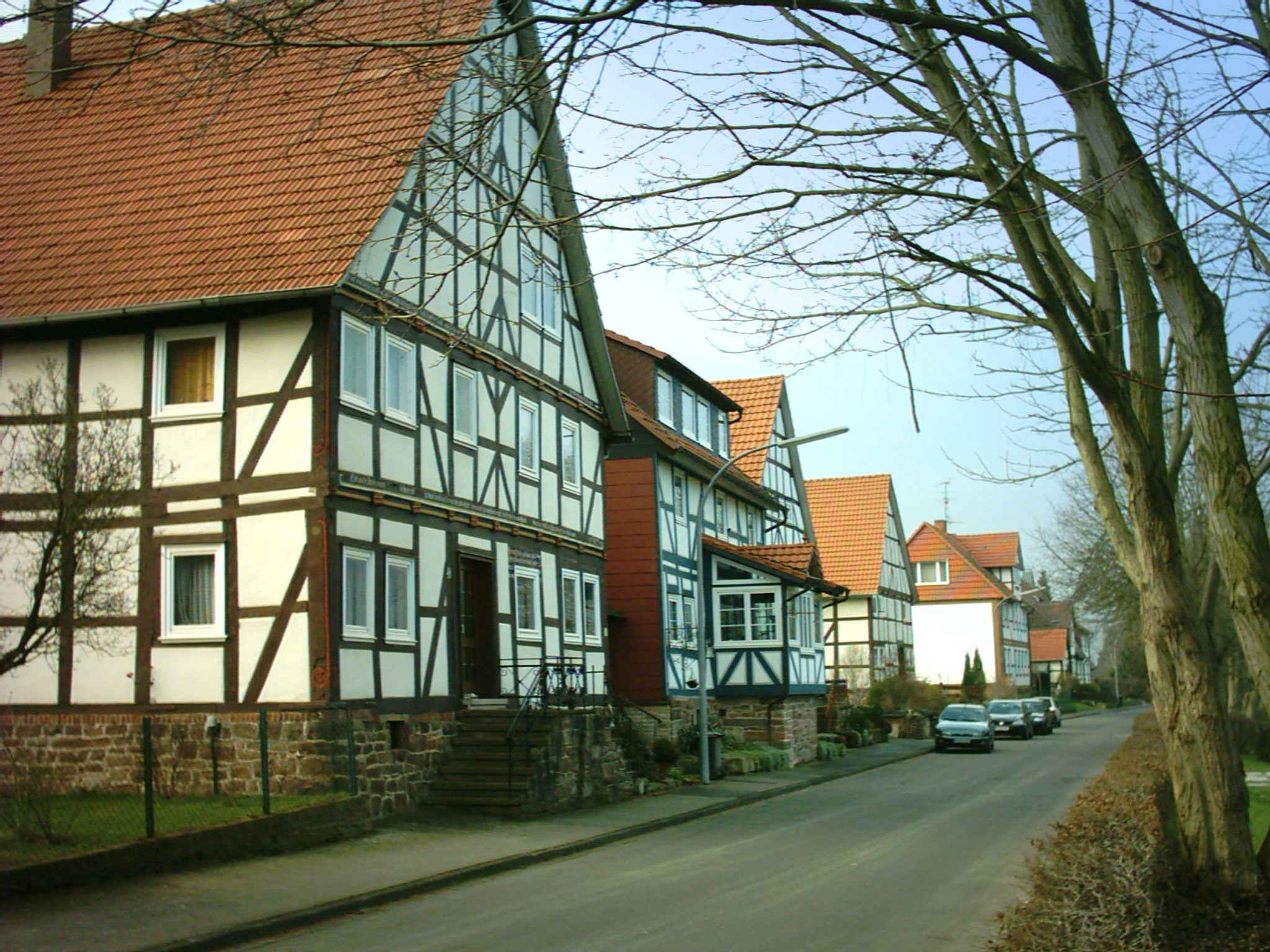 Fachwerkensemble in Reinhardshagen-Vaake, Am Weserufer 9 - 11; - selbst fotografiert Jan. 2006 - GNU-FDL